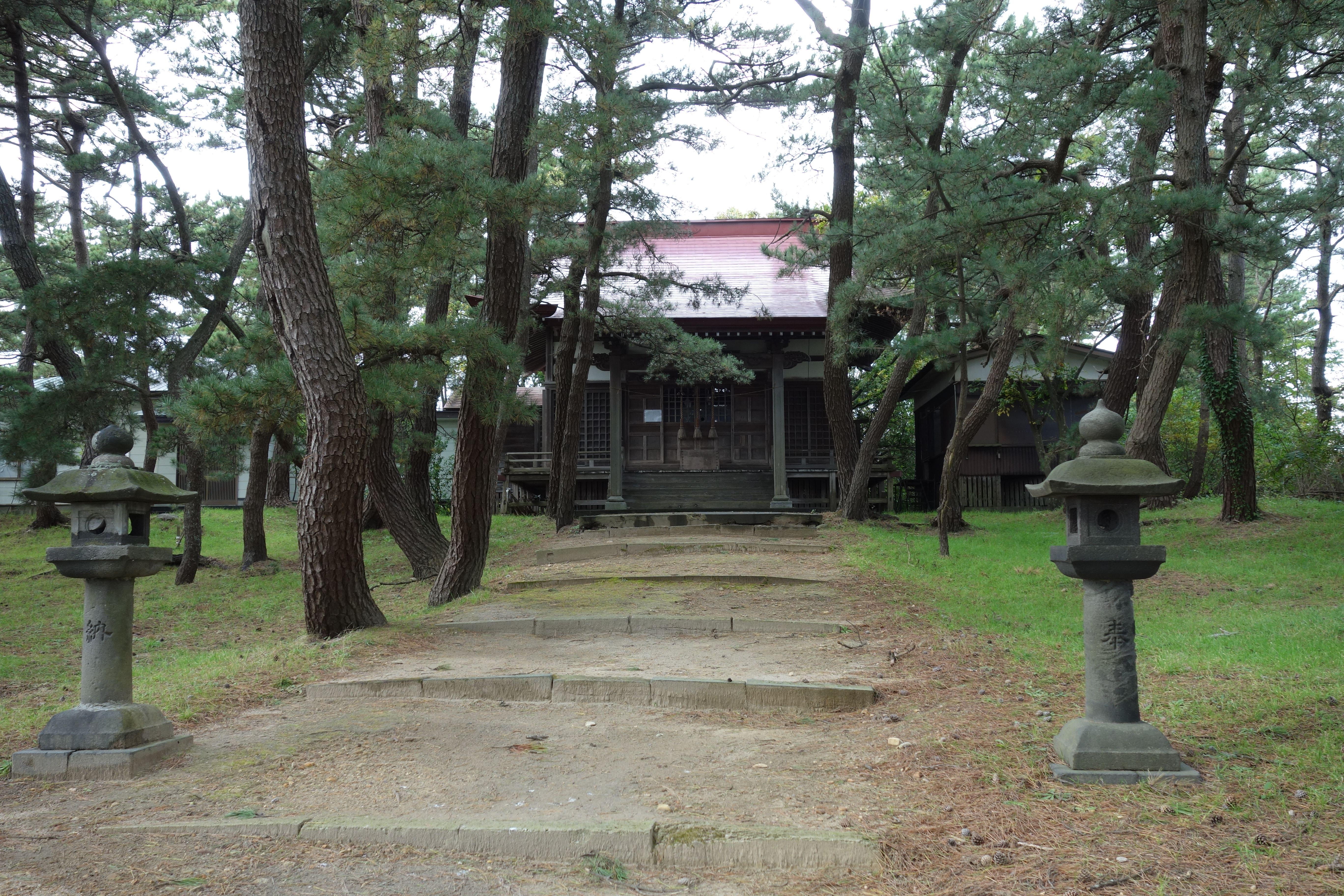 秋田市新屋栗田神社